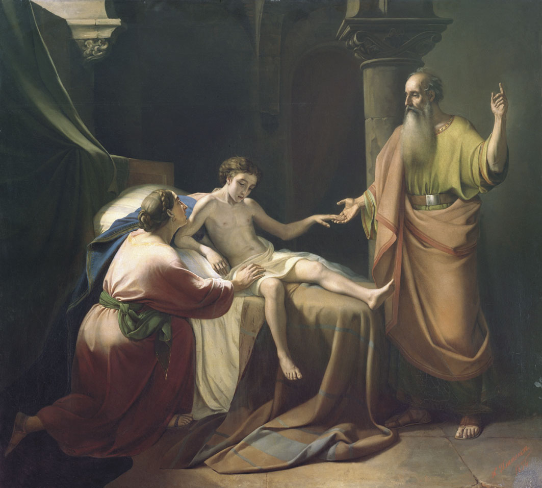 Воскрешение пророком Елисеем сына Сарептской вдовицы